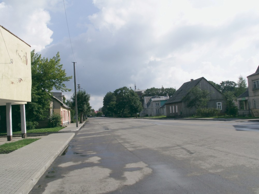 Kvėdarnos miesto centras.